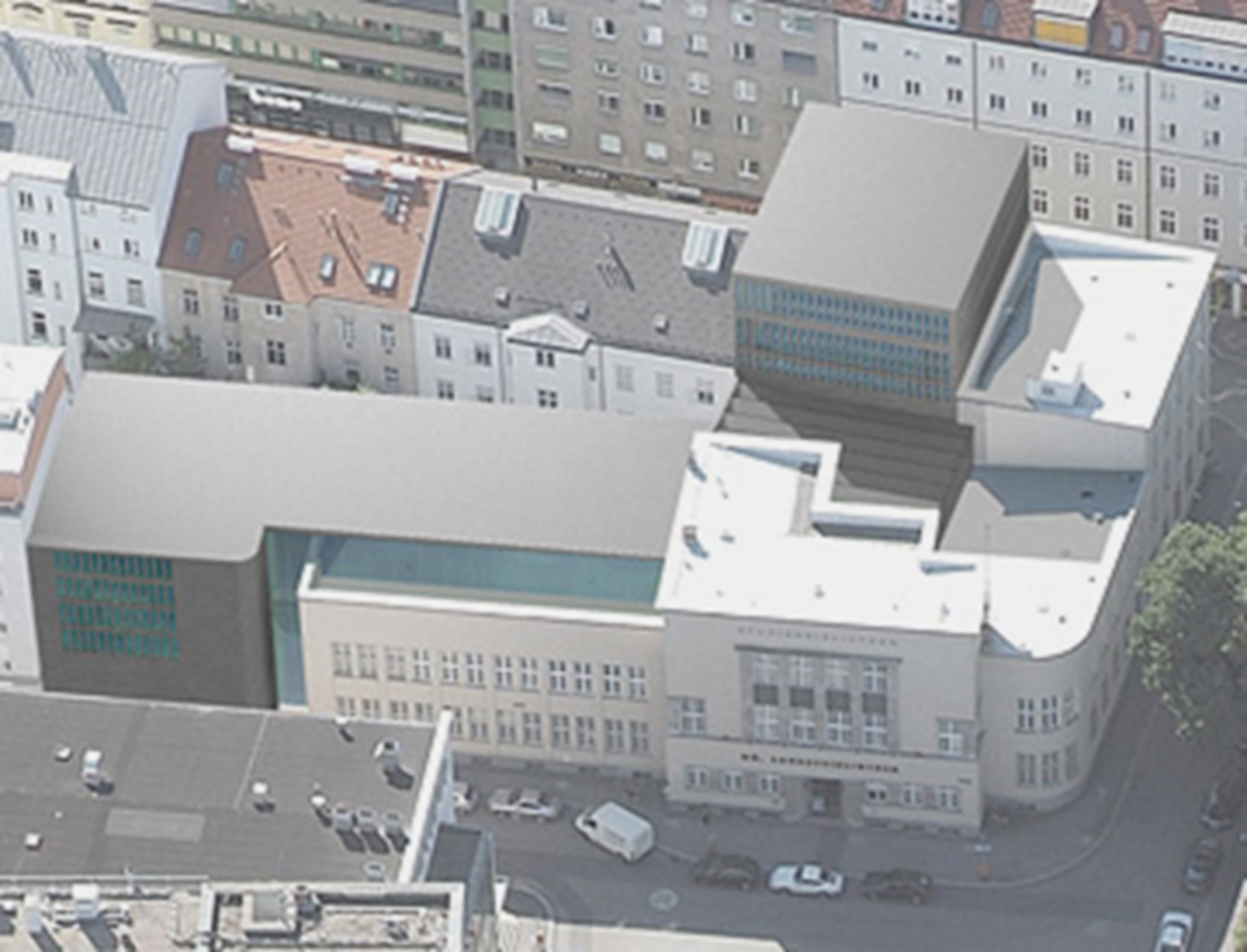 Ansicht der Landesbibliothek mit zukünftigem Um- bzw. Anbau